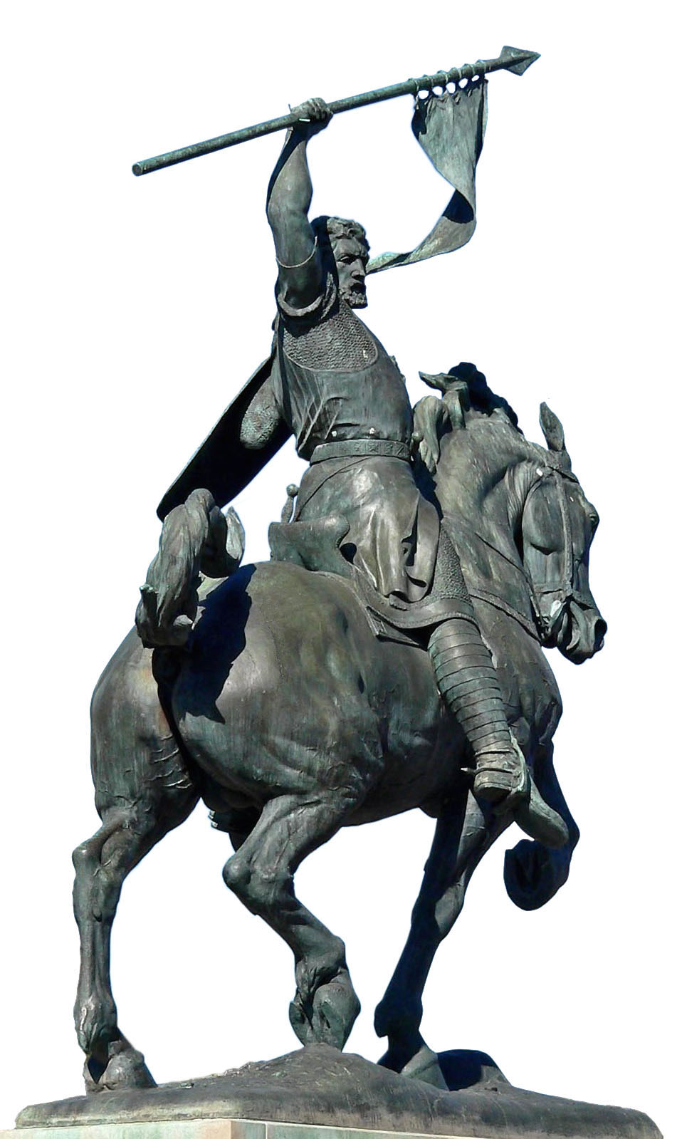 Statue equestre du Cid Campeador dans le Balboa Park, San Diego